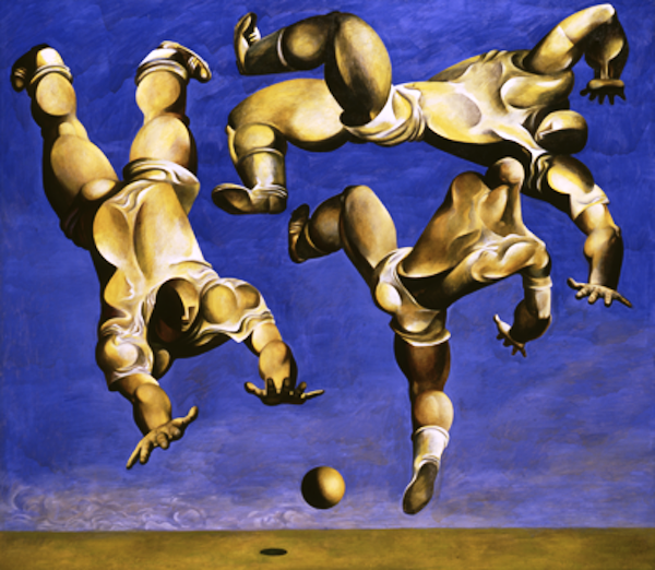 Миша Брусиловский. Игра в мяч (Футбол). Холст, масло. 158х180. 1965 год.